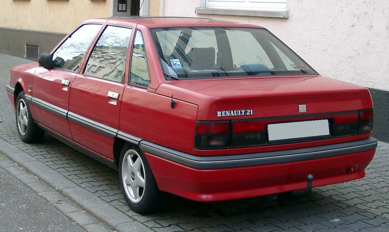 Renault 21